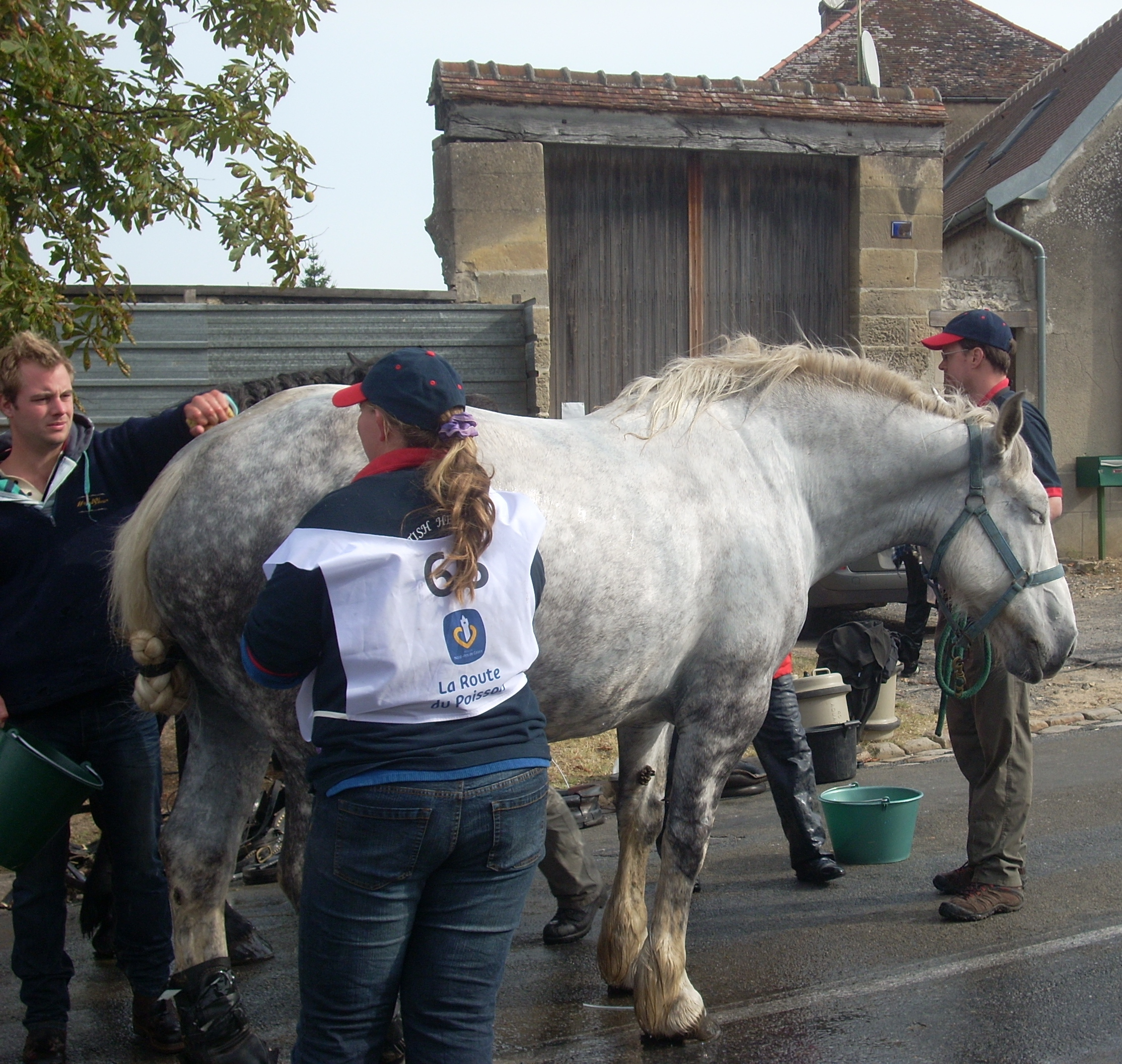 Contrôle vétérinaire d'un Percheron durant la route du Poisson 2012